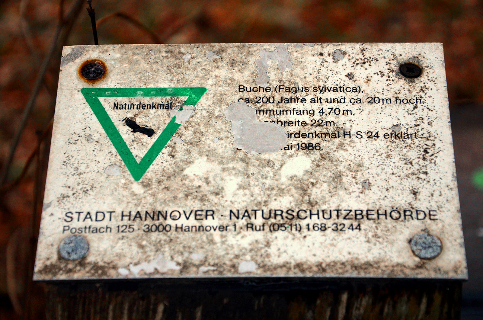 Auf einen Holzpflock genagelte, bereits leicht erodierte Hinweistafel der Stadt Hannover - Naturschutzbehörde, zum Naturdenkmal der Rotbuche auf dem Grundstück Groß-Buchholzer Kirchweg 66 in Groß-Buchholz, Hannover: „Buche (Fagus sylvatica) / ca. 200 Jahre alt und ca. 20 m hoch / Stammumfang 4,70 m / Kronenbreite 22 m / Zum Naturdenkmal H-S 24 erklärt / ... Mai 1986“